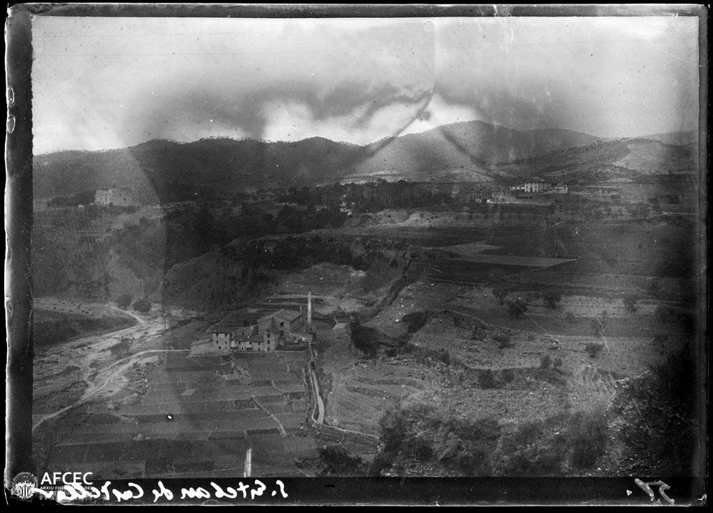 Imatge